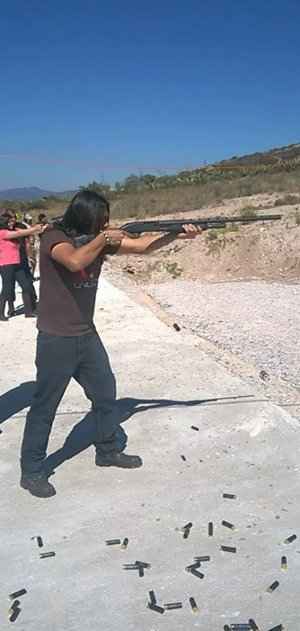 Disparo de escopeta